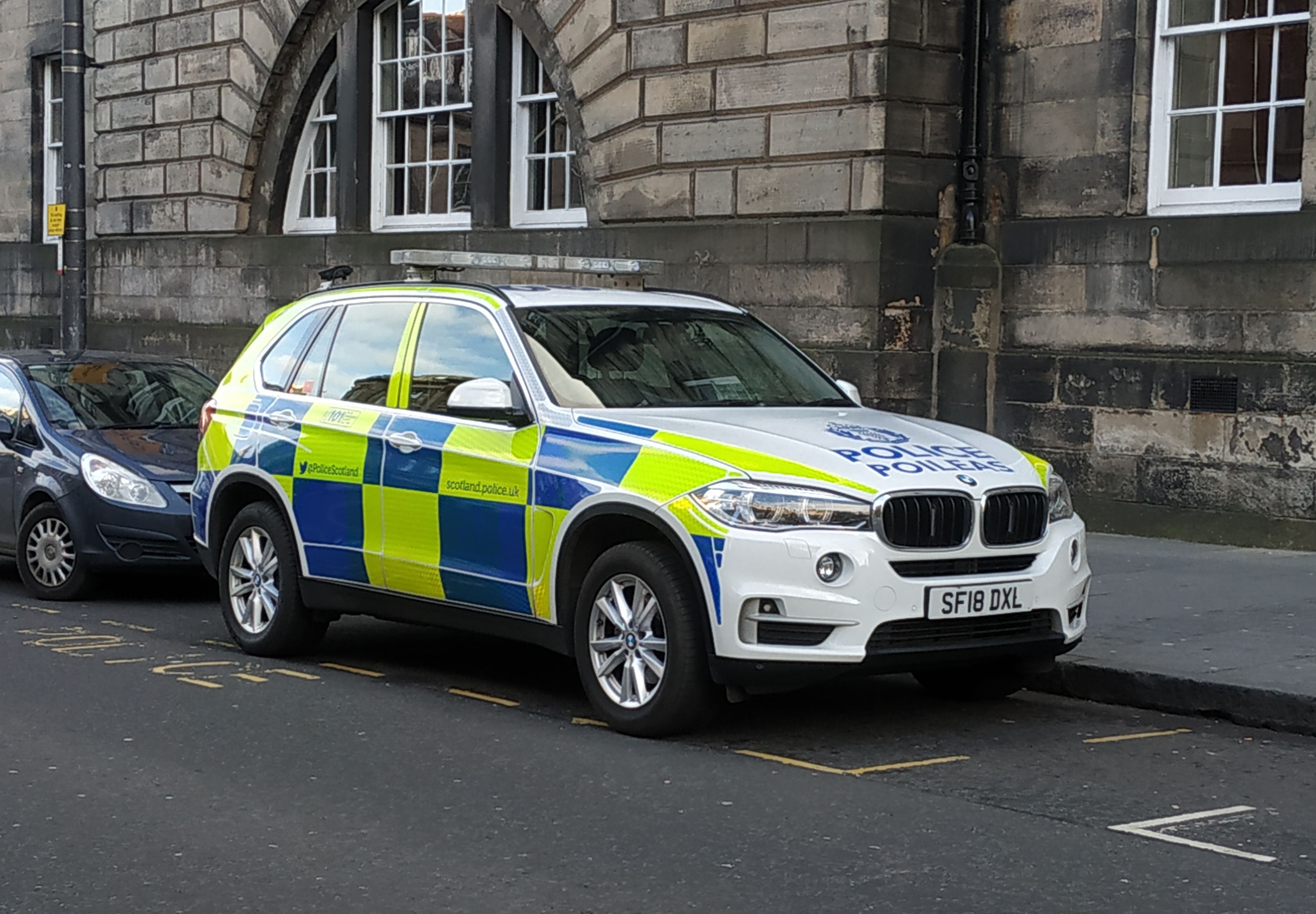 BMW X5 de la police en Ecosse, à Édimbourg